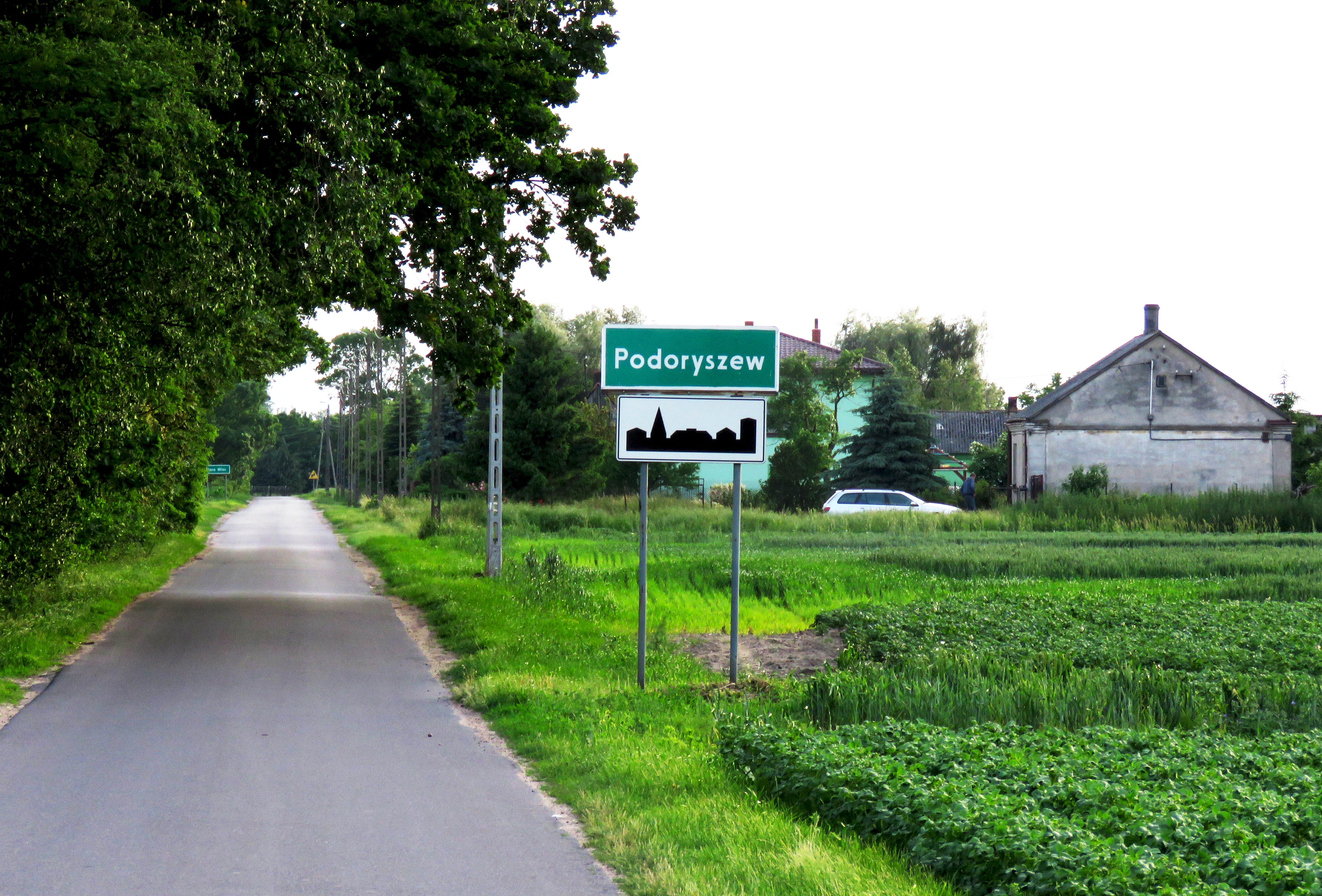 Podoryszew gmina Wiskitki